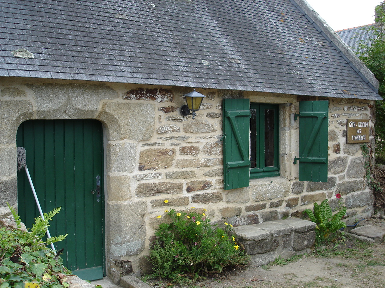 Maison ou habita Georges Perros à Douarnenez. Elle sert actuellement de gîte rural (d'où le balai devant la porte) Photo Guy Bourrel